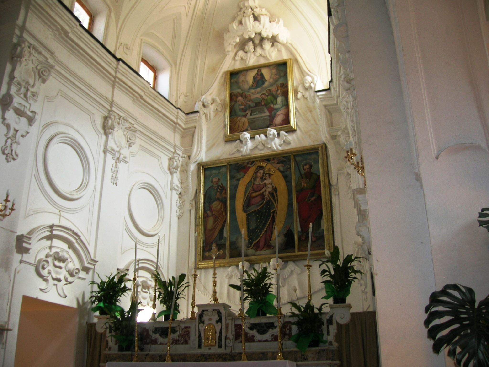 Chiesa di Santa Maria dell'Assunta a Gragnano